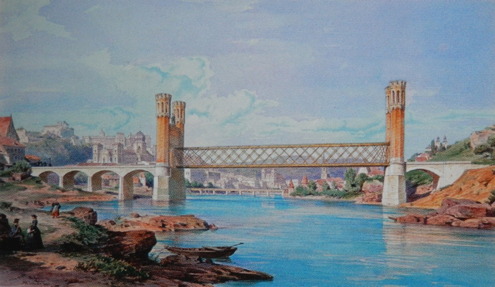 Ansicht der Passauer Innbrücke aus der Aquarell-Serie "Ansichten von Ortschaften an den bayerischen Ostbahnen" von Albert Emil Kirchner